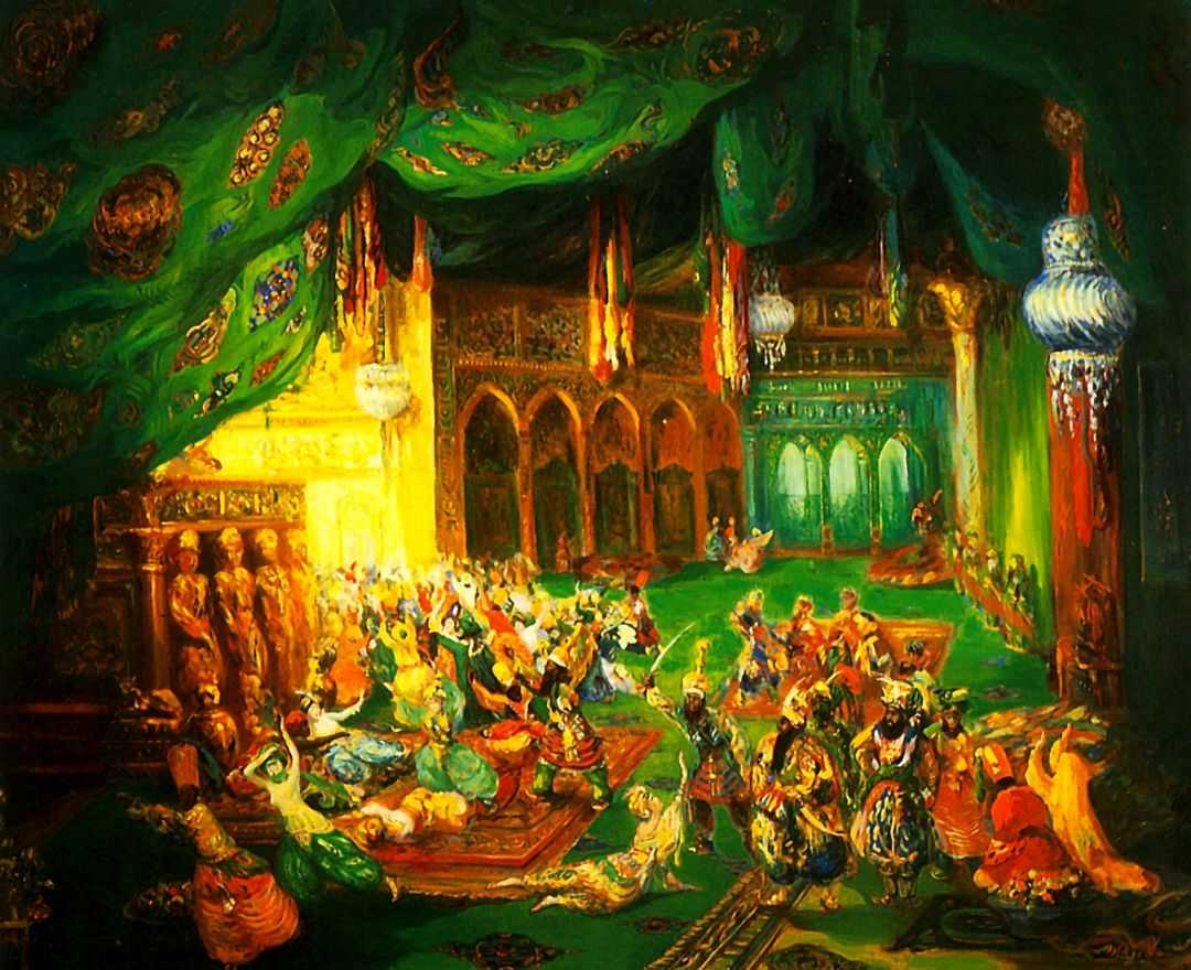 Бакст Лев Самуилович. Эскиз декорации к балету *Шехеразада* на музыку Н.А.Римского-Корсакова.